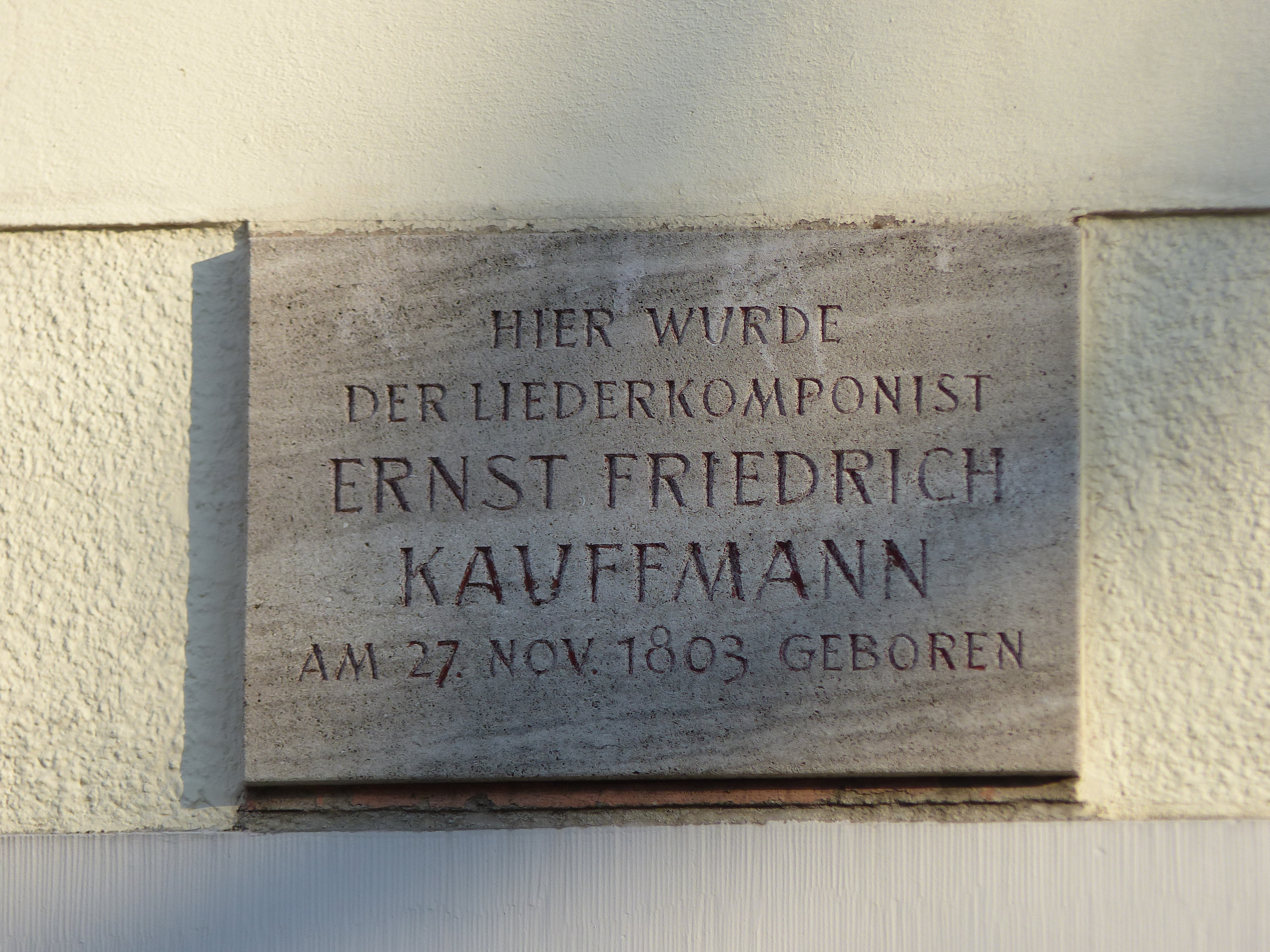 Gedenktafel an Ernst Friedrich Kauffmann an der Fassade des Hauses Schorndorfer Straße 26 in Ludwigsburg